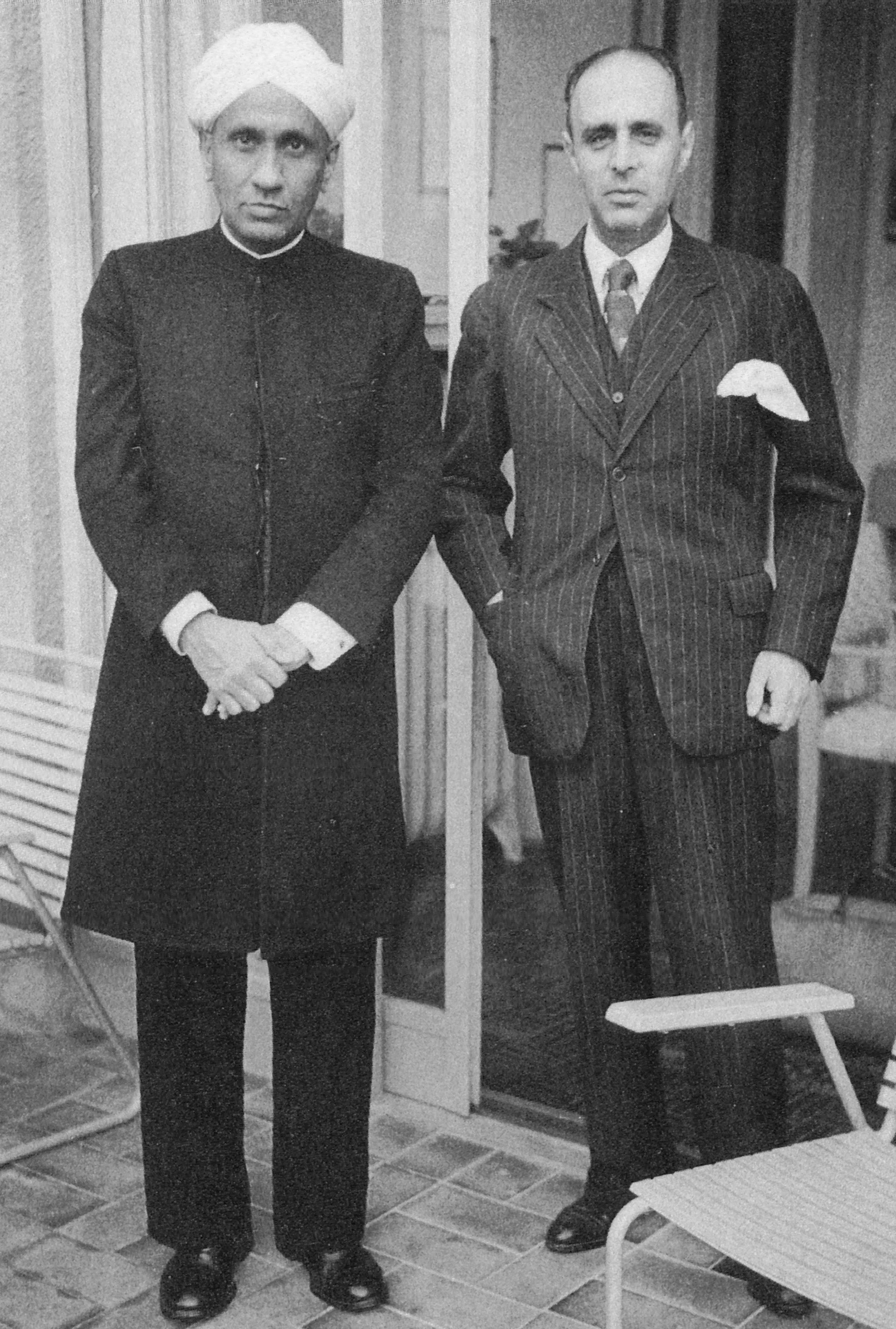 Richard Bär (1892–1940), schweizer Physiker und Bankier mit C. V. Raman (1888–1970), indischer Physiker